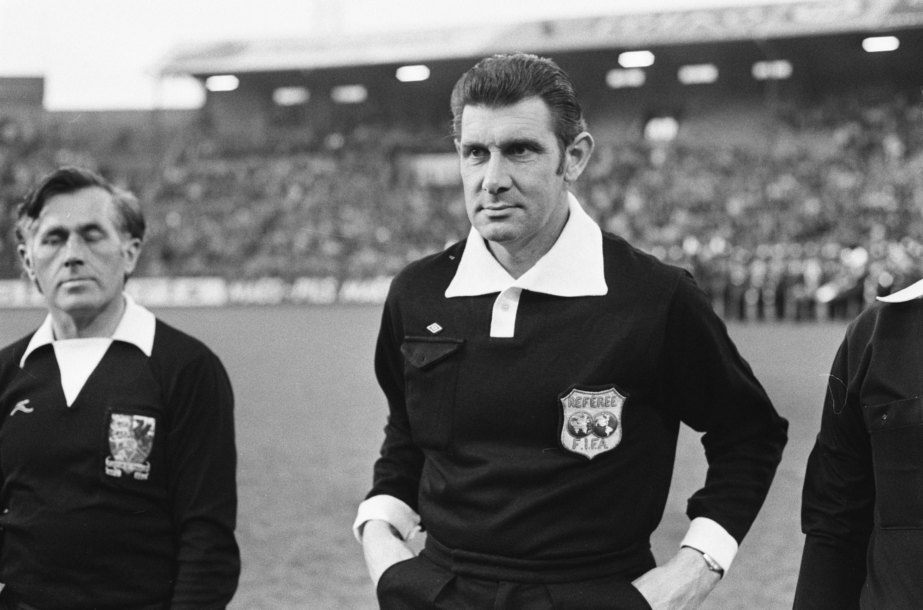 Collectie / Archief : Fotocollectie Anefo Reportage / Serie : België-Nederland 1-0 Beschrijving : Scheidsrechter Jack Taylor (Engeland) Datum : 30 april 1975 Locatie : Antwerpen, België Trefwoorden : interlands, scheidsrechters, sport, voetbal Persoonsnaam : Taylor, Jack Fotograaf : Peters, Hans / Anefo Auteursrechthebbende : Nationaal Archief Materiaalsoort : Negatief (zwart/wit) Nummer archiefinventaris : bekijk toegang 2.24.01.05 Bestanddeelnummer : 927-9042